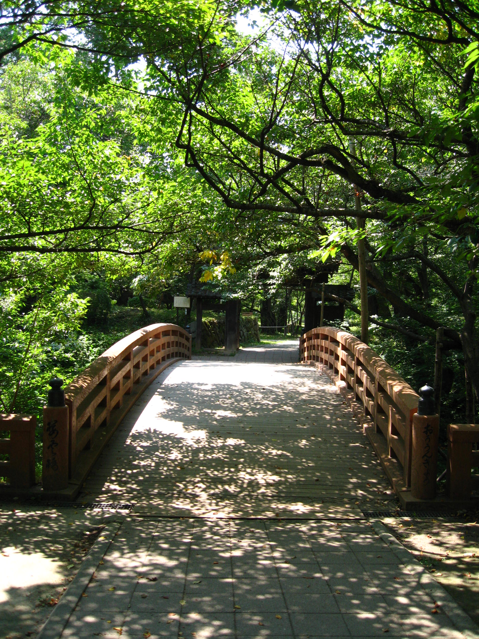 長野県 高遠城址公園(Takato-Joushikouen-park.Nagano)